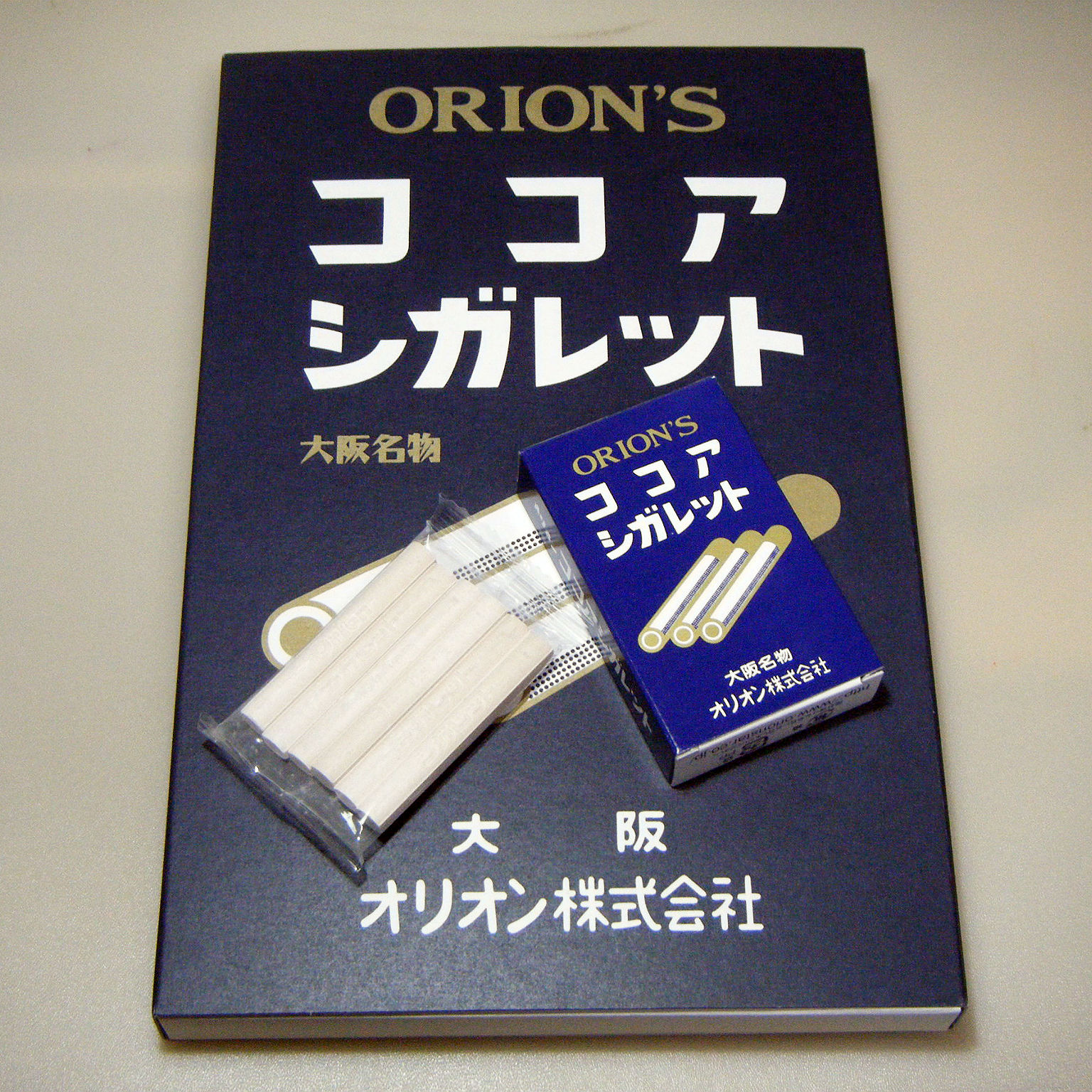 オリオン ココアシガレット 10箱入